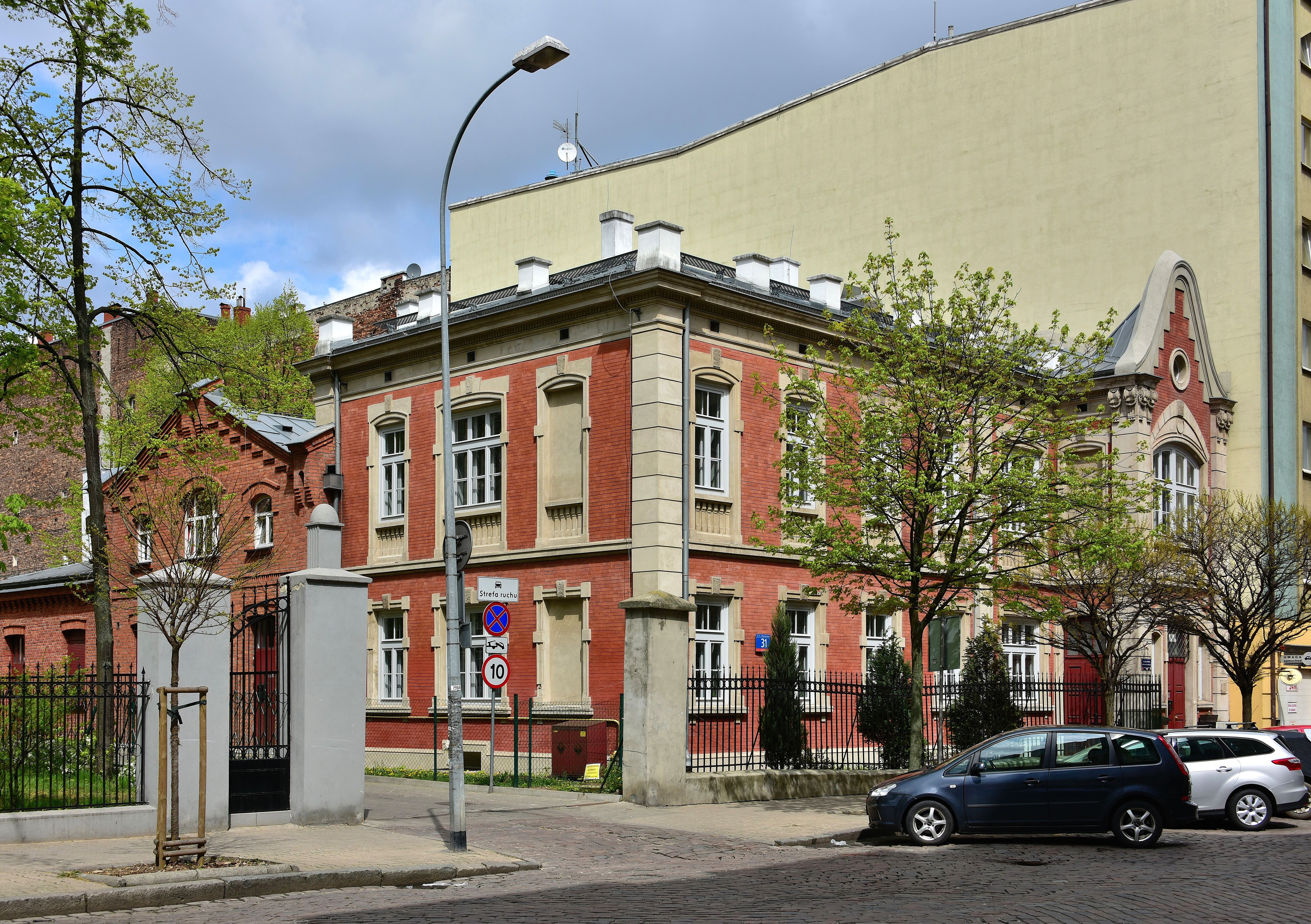 Dawna mykwa przy ul. Kłopotowskiego 31 w Warszawi